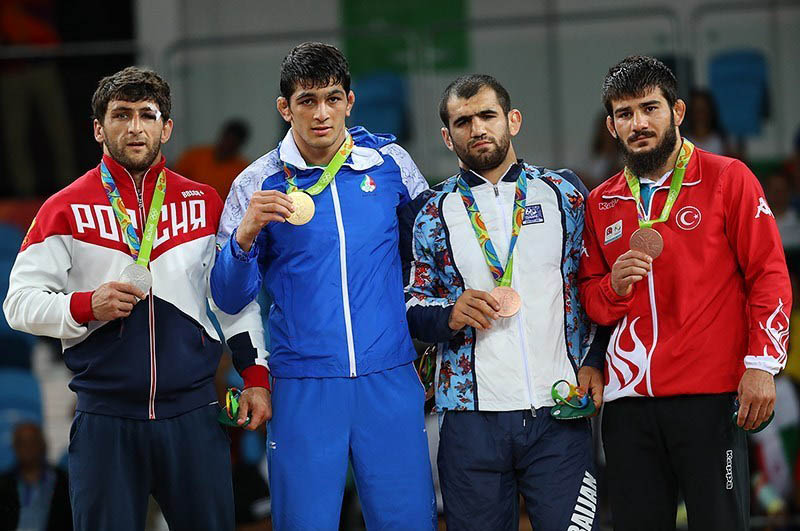 مدال‌آوران مسابقات کشتی آزاد المپیک ریو دو ژانیرو در وزن 74 کیلوگرام.